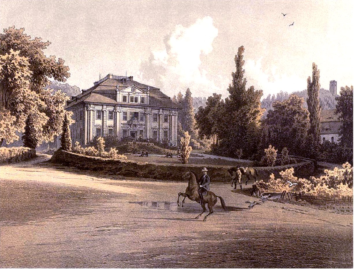 Schloss Maiwaldau, Kreis Schönau